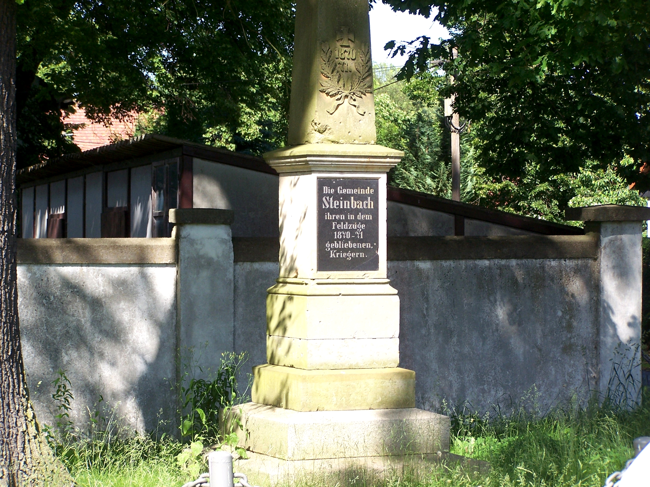 Kriegerdenkmal in Steinbach (Rothenburg/O.L.), Rothenburg/O.L., Landkreis Görlitz